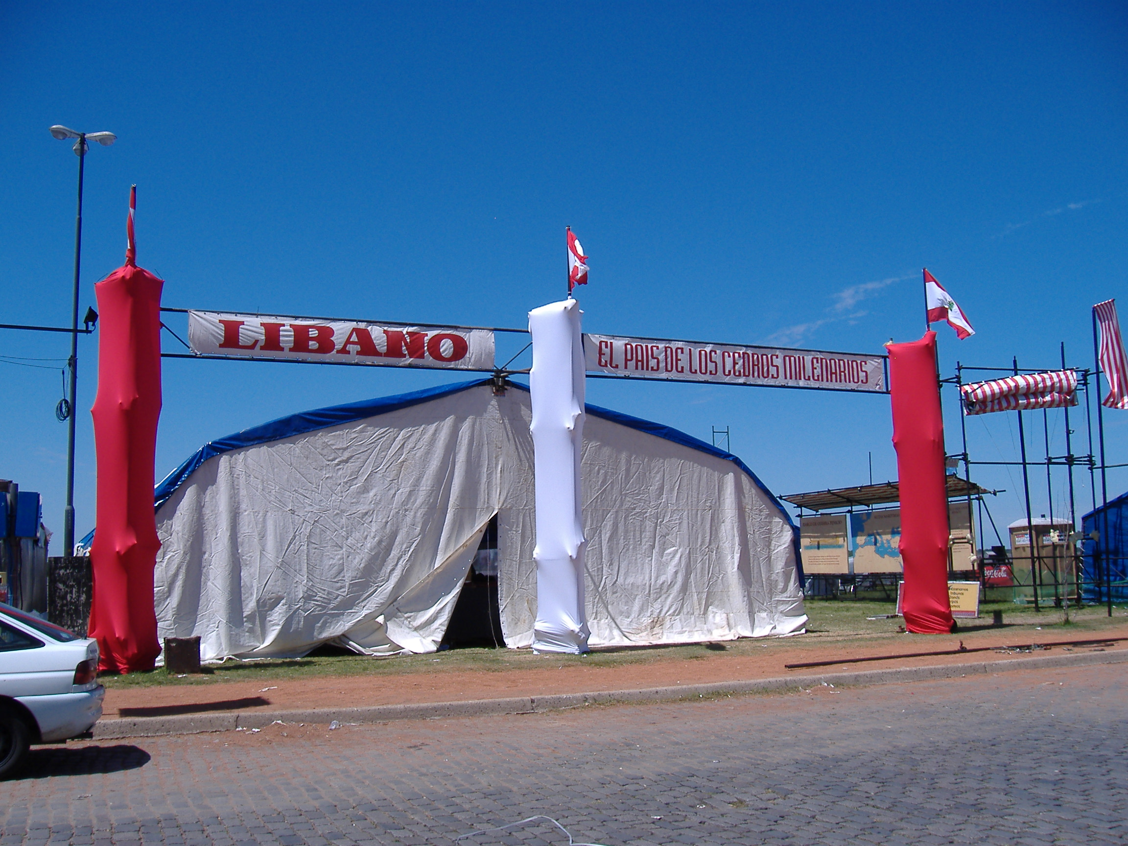 Lebanon's place at the Encuentro y Fiesta Nacional de Colectividades, Rosario, Argentina.